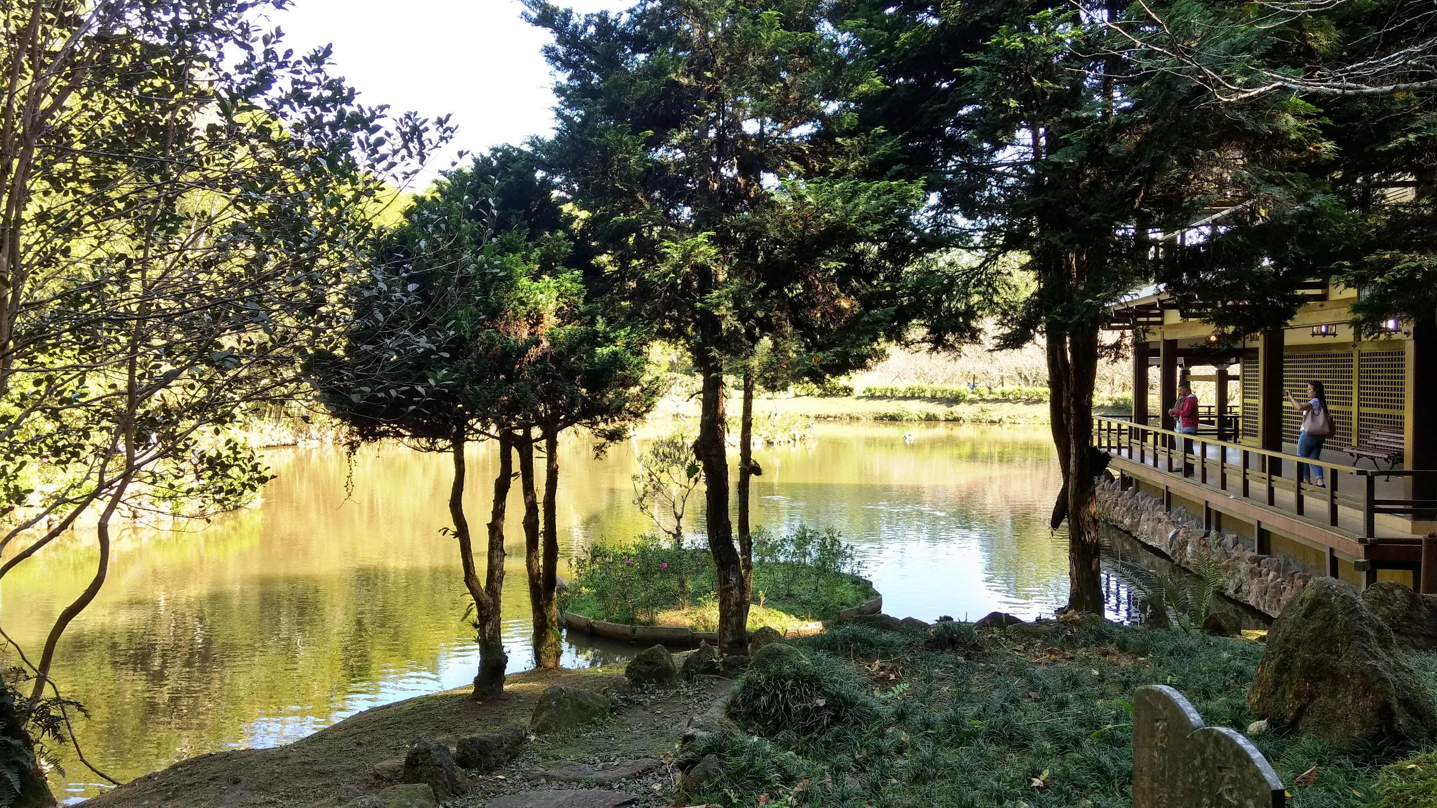 O Kinkaku-ji do Brasil é uma réplica do templo Kinkaku-ji japonês de mesmo nome construído no século XIV e assim como seu modelo, o Kinkaku-ji é entornado por um lago povoado por carpas coloridas (nishikigois). Fica no município de Itapecerica da Serra a trinta e três quilômetros da capital de São Paulo. Diferentemente do seu modelo japonês, o Kinkaku-ji do Brasil é um templo ecumênico e um cinerário, ao passo que o Kinkaku-ji japonês é um templo de orientação zen-budista.